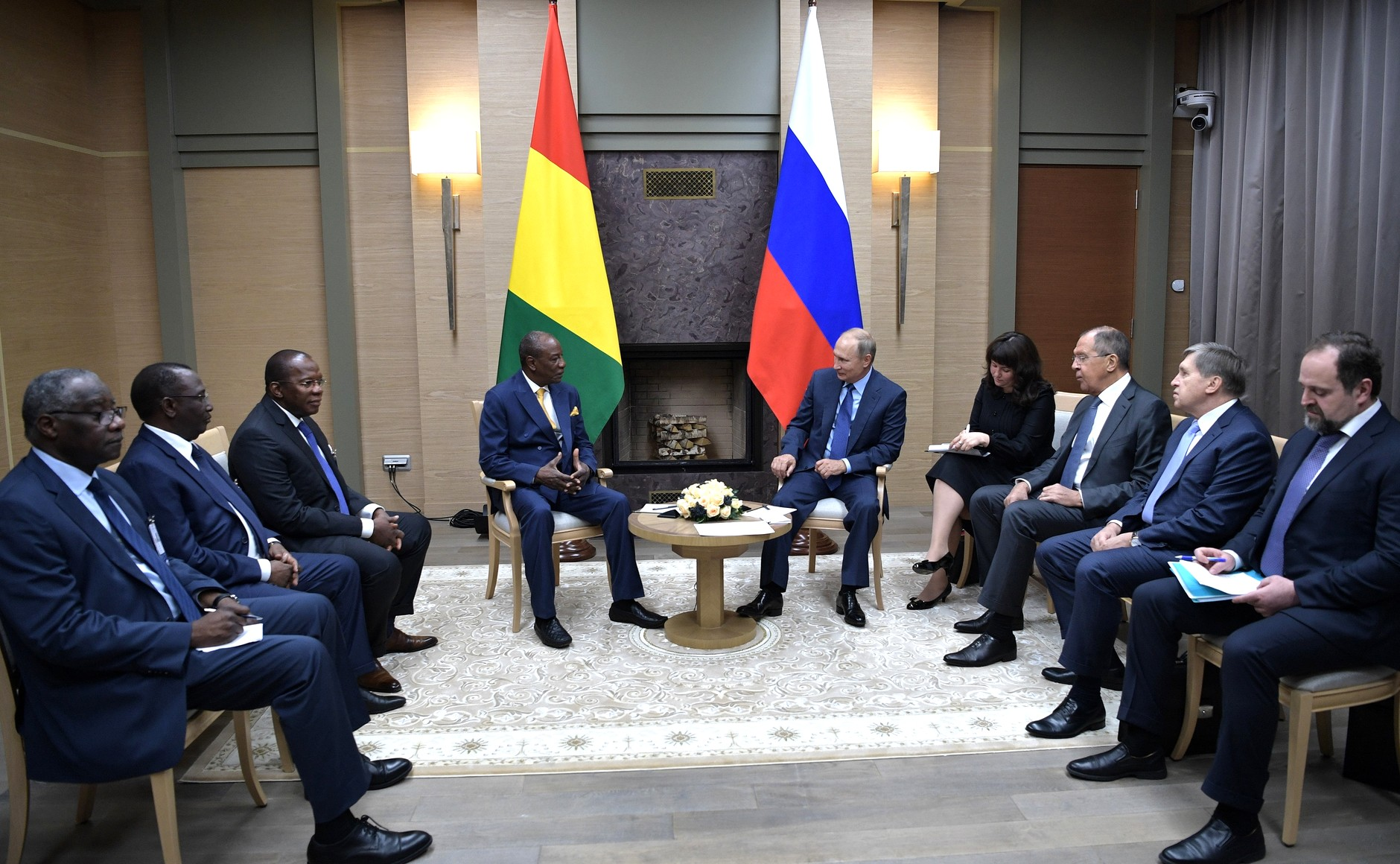 Президент России Владимир Путин с Президентом Гвинейской Республики, действующим Председателем Африканского союза Альфой Конде